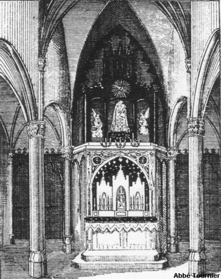 Ancien sanctuaire du Moyen-Age de la chapelle Notre-Dame-du-Haut à Ronchamp.